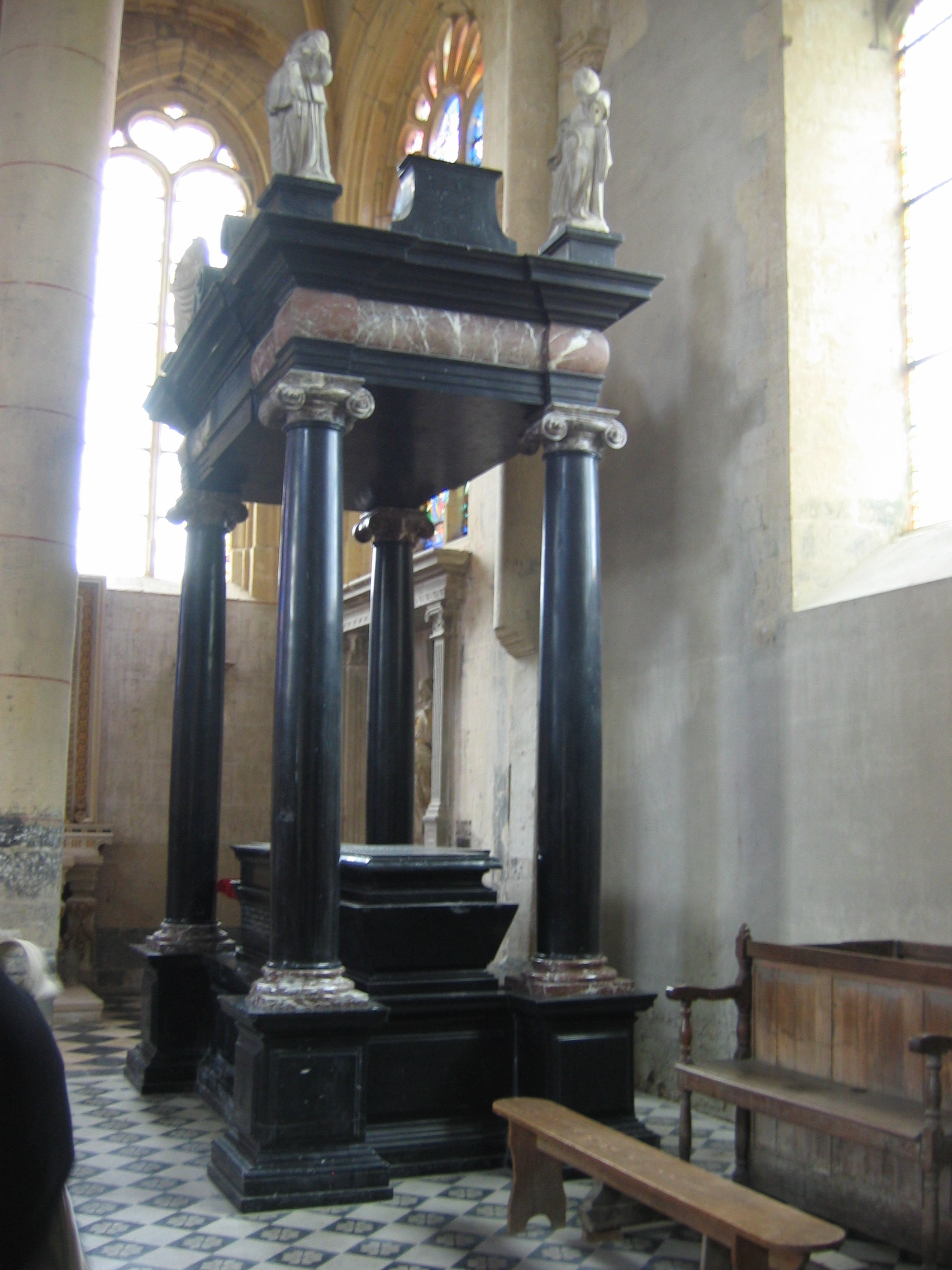 Église Saint-Médard de Grandpré : tombeau en marbre noir des comtes de Joyeuse